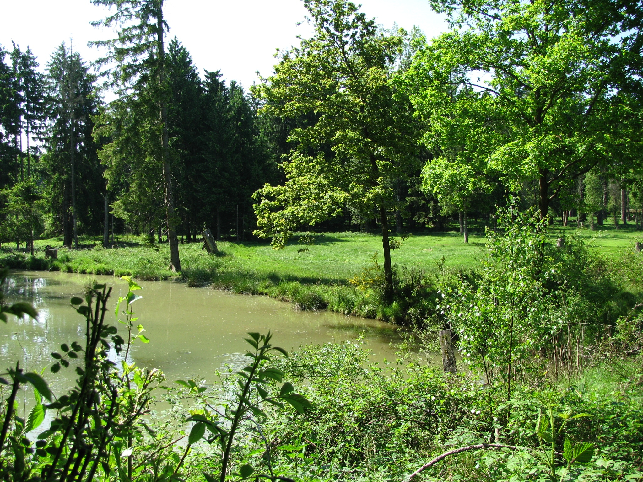 Ausblick von der Wildbeobachtungsstelle am Ludwigsgeräumt